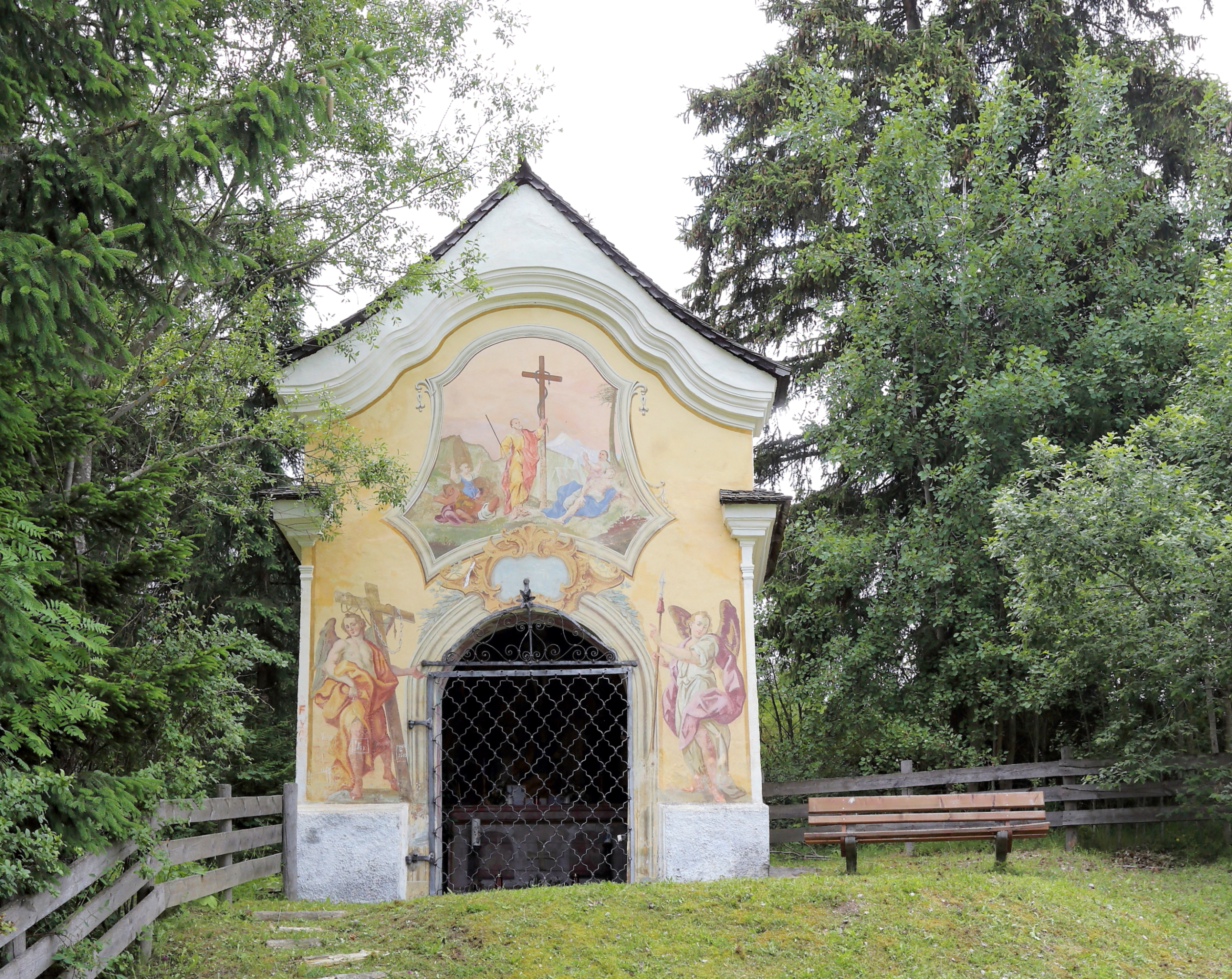 Kreuzbühel- bzw. Kirchbichlkapelle in der Salzburger Gemeinde Sankt Andrä im Lungau.